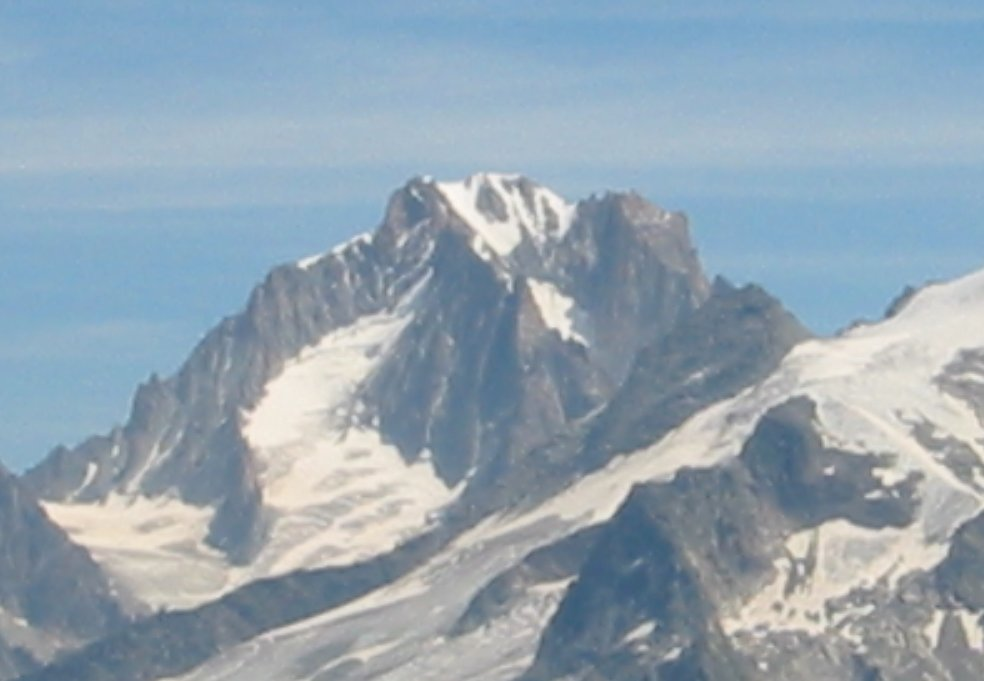 L’Aiguille d'Argentière depuis le Brévent, 2006.